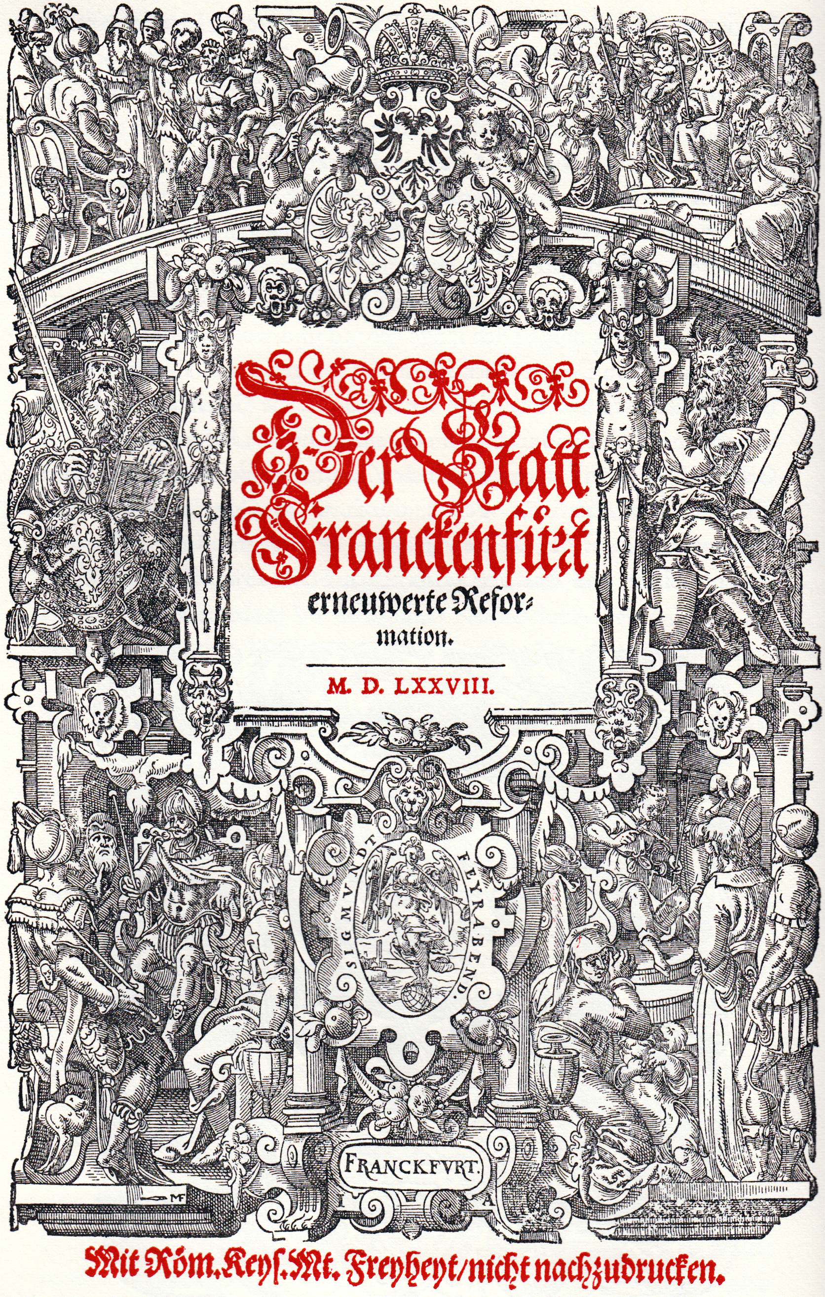 Titelblatt des Frankfurter Zivilgesetzbuches „Der Stadt Frankfurt erneuerte Reformation“ aus dem Jahr 1578